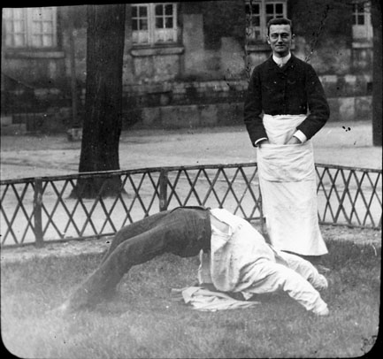 Fonds Trutat - Photographie ancienne Cote : TRU C 1333 Localisation : Fonds ancien (S 30) Original non communicable Titre : Attaque d'hystérie, homme Auteur : Albert Londe (?) Rôle de l’auteur : Photographe Lieu de création : Non identifié Date de création : 1859-1910 [entre] Mesures : : 12 x 9 cm Observations : Cette plaque n'est surement pas de Trutat mais ferait partie de sa collection de plaques de projection destinées à ses cours Mot(s)-clé(s) : -- Homme -- Costume masculin -- Médecin -- Parc -- Barrière -- Maison -- Hôpital -- Arbre -- Fenêtre -- Couché -- Folie -- Malade -- Non identifié -- 19e siècle, 2e moitié -- 20e siècle, 1e quart Médium : Photographies -- Négatifs sur plaque de verre -- Noir et blanc -- Portraits Bibliothèque de Toulouse. Domaine public